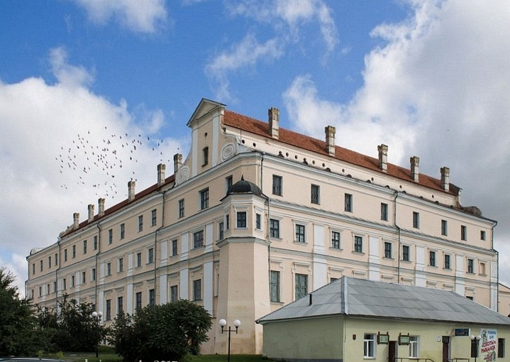 Цэнтр Пінска